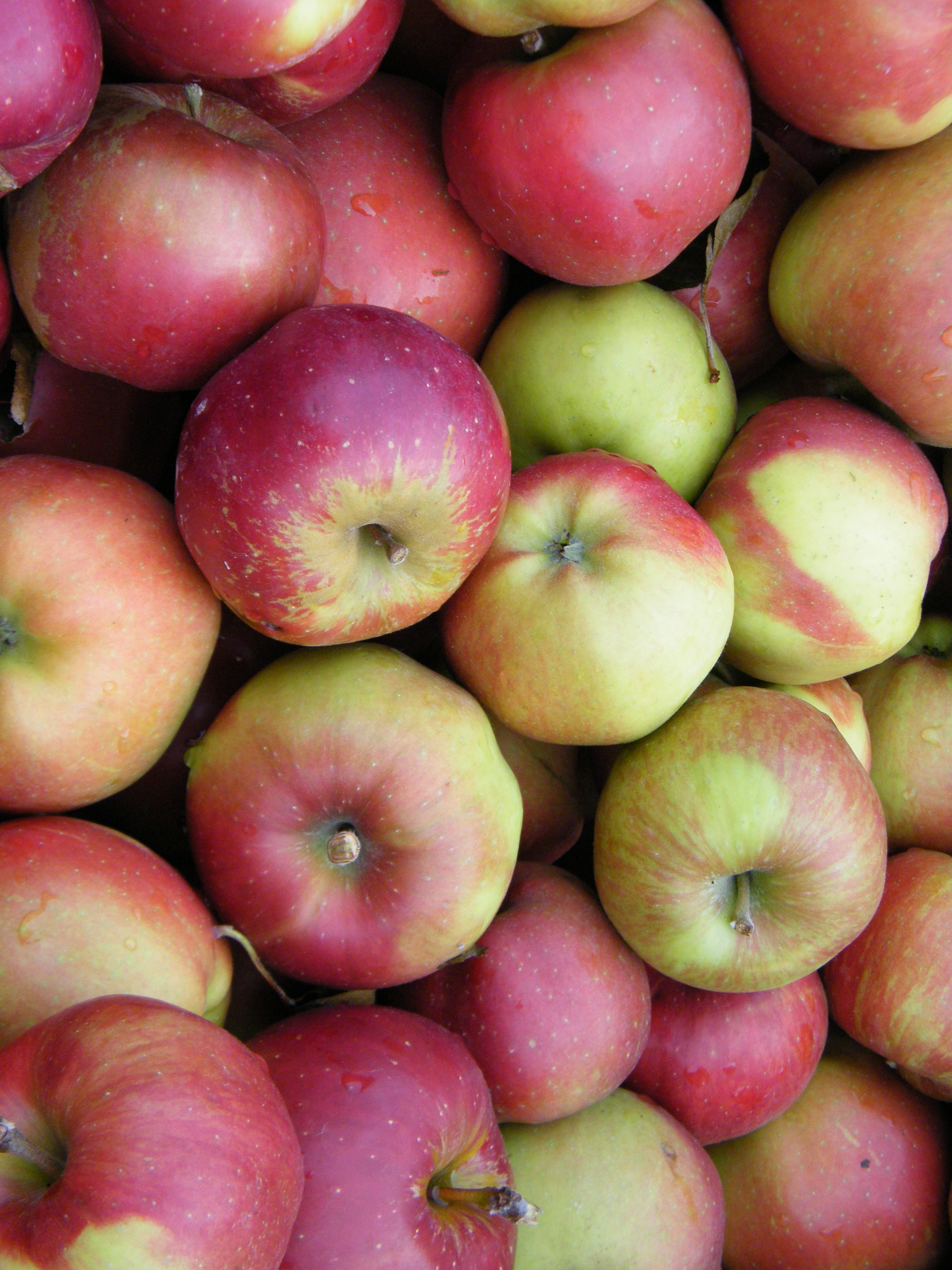 Pommes Melrose, Franc-Picard, Vron, Somme,Fr